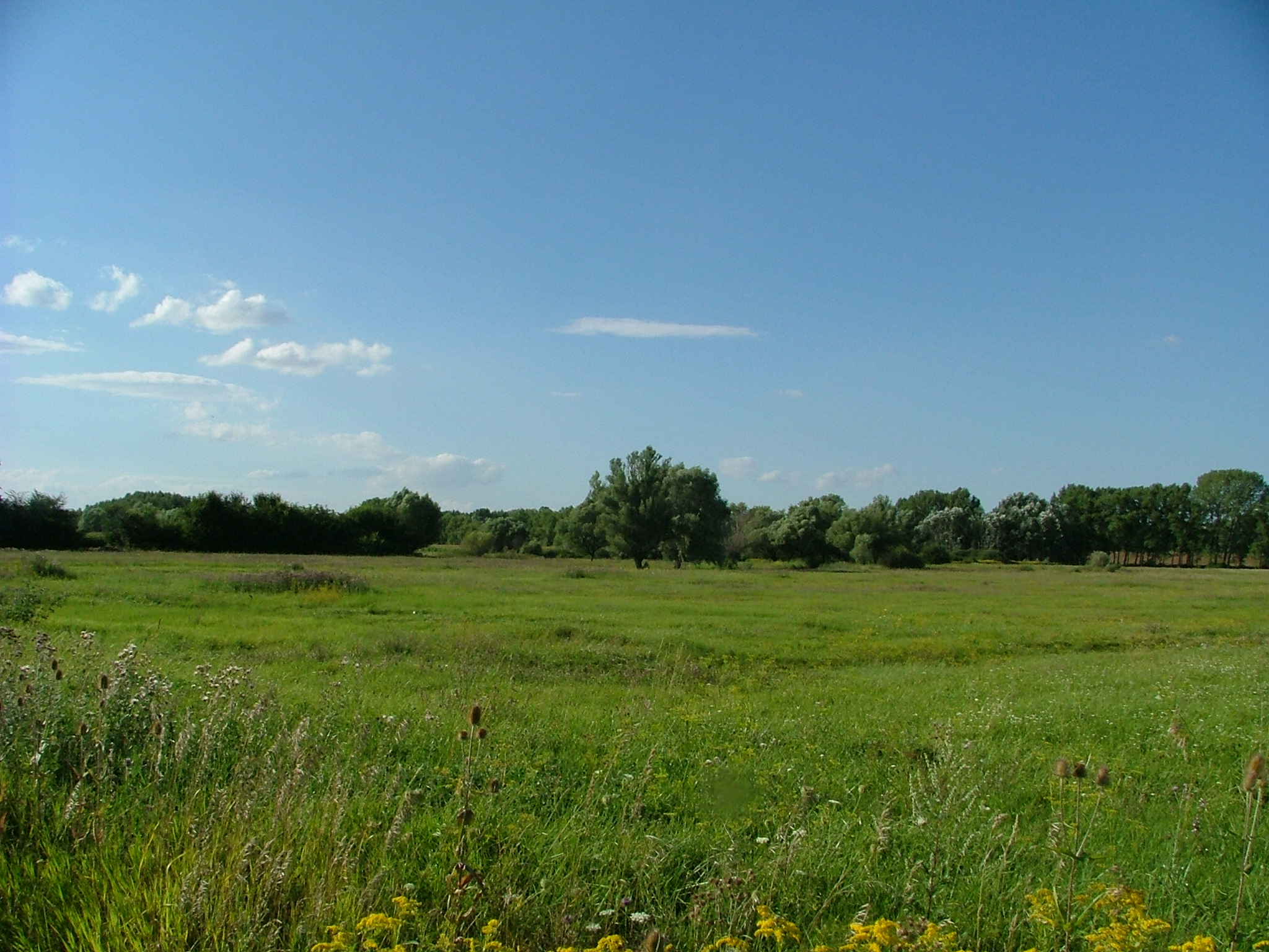 Wet meadow in Szigetköz, Western Hungary.